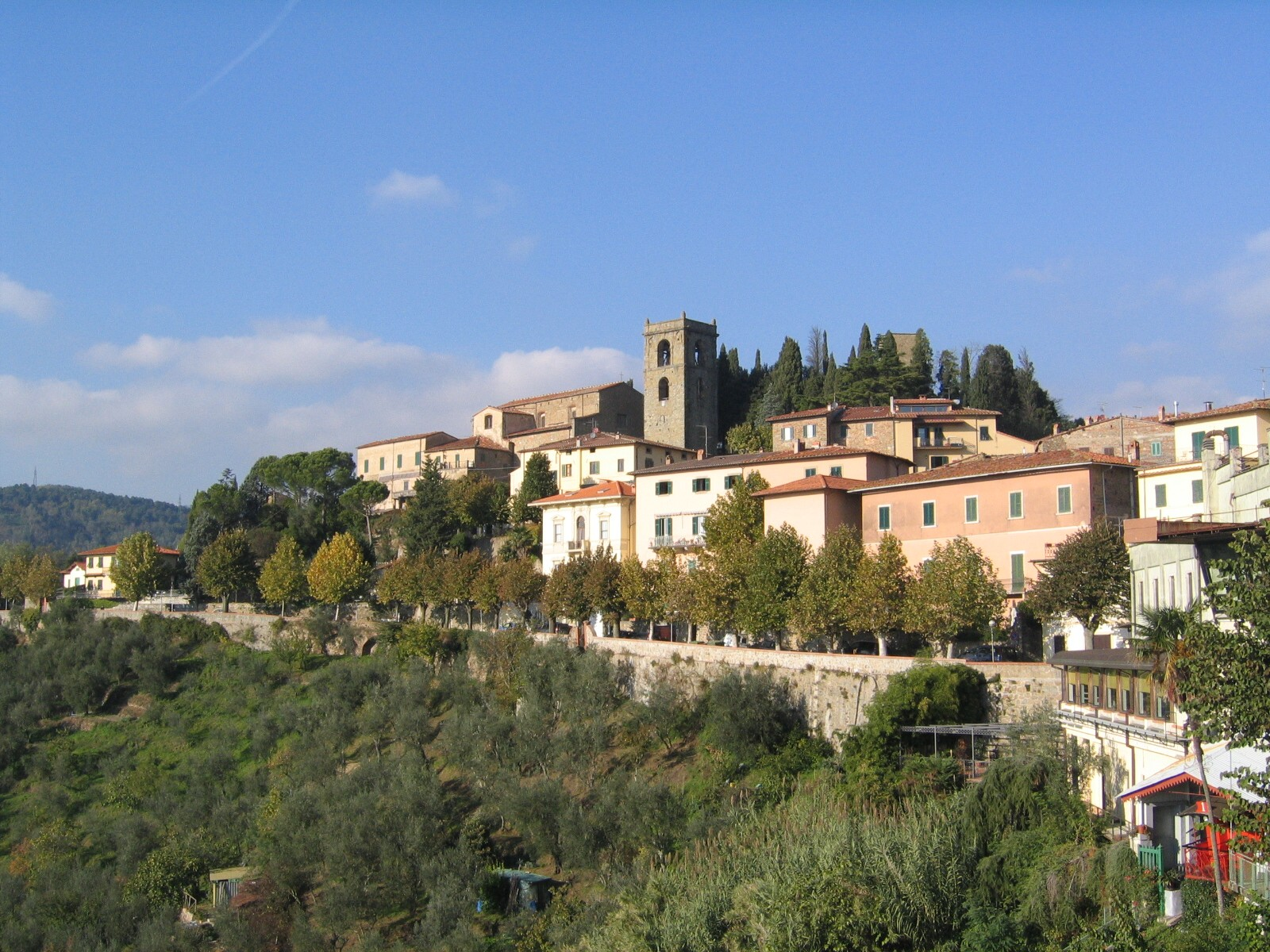 Montecatini Terme, Montecatini Alto, Panorama